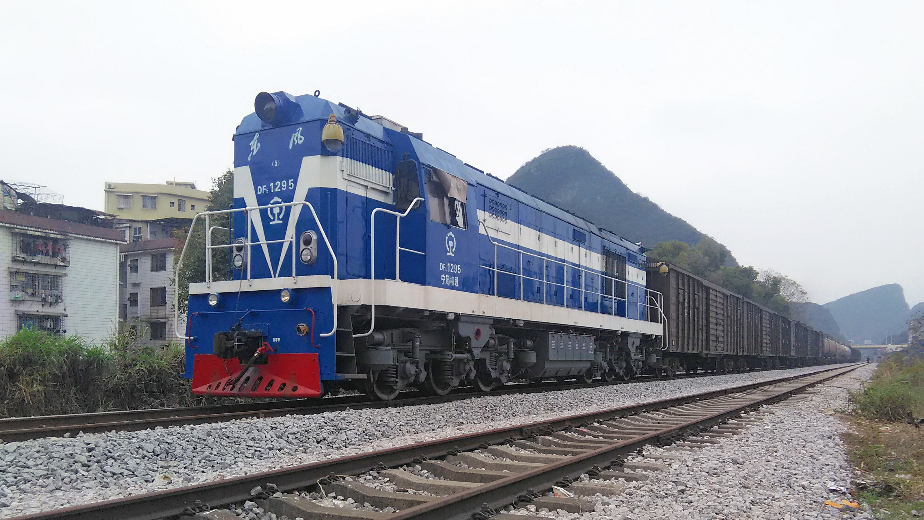 第1295号东风5型内燃机车牵引上行货列，通过猴山社区前往桂林站